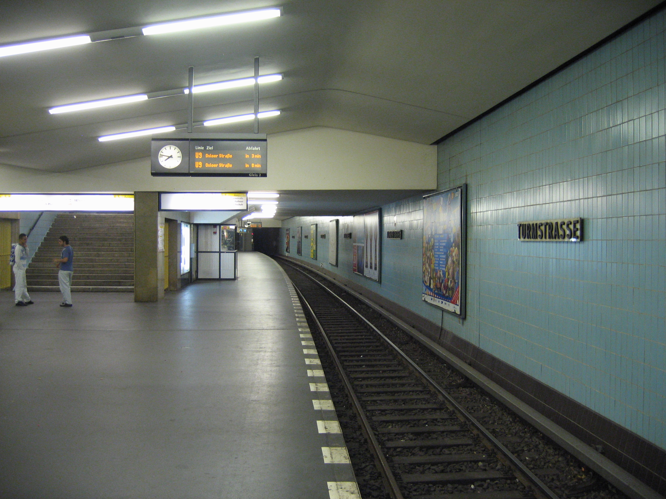 U-Bahnhof Turmstraße, Berlin